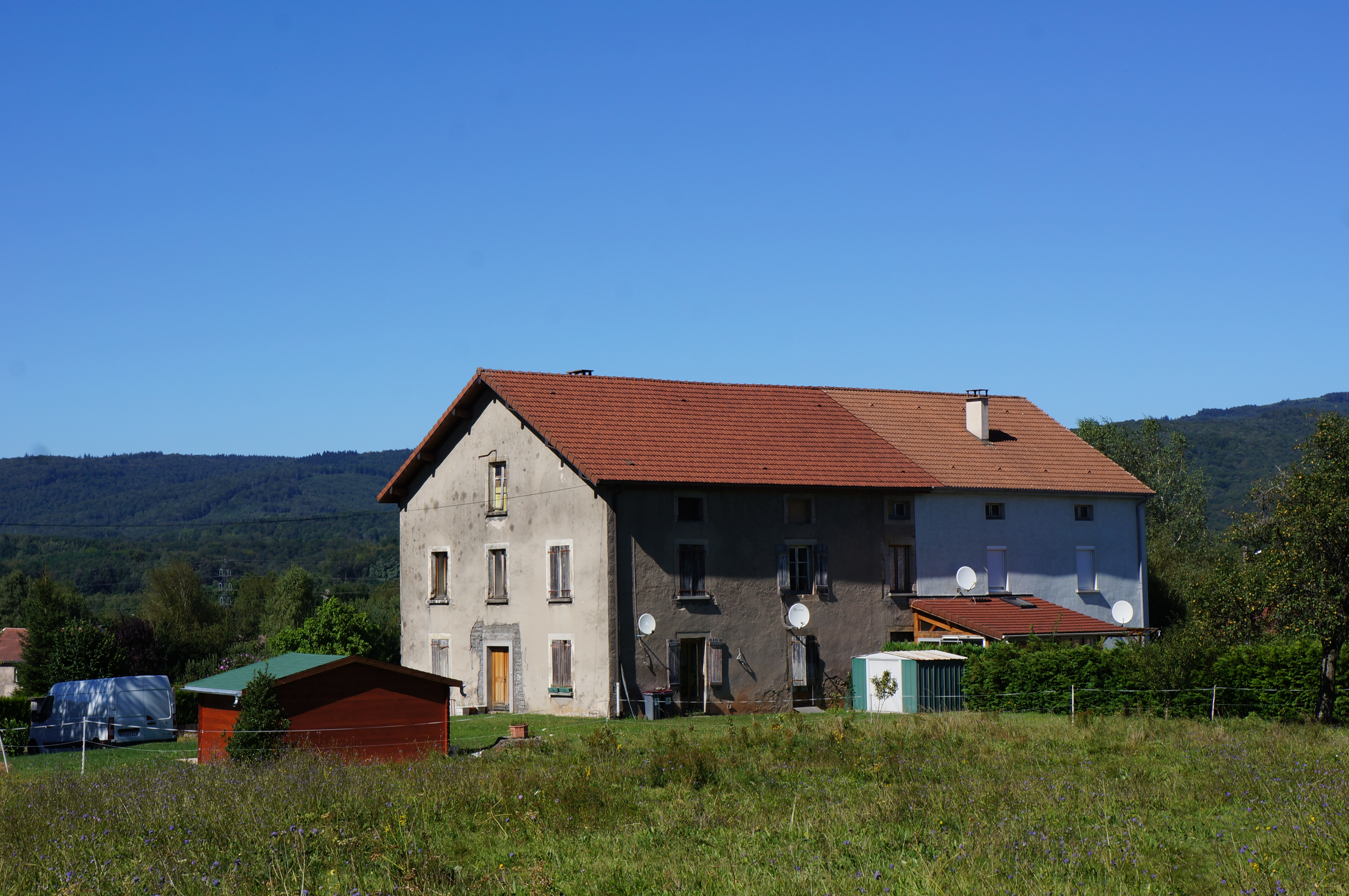 Logements de mineurs à Éboulet en Haute-Saône dans l'est de la France.